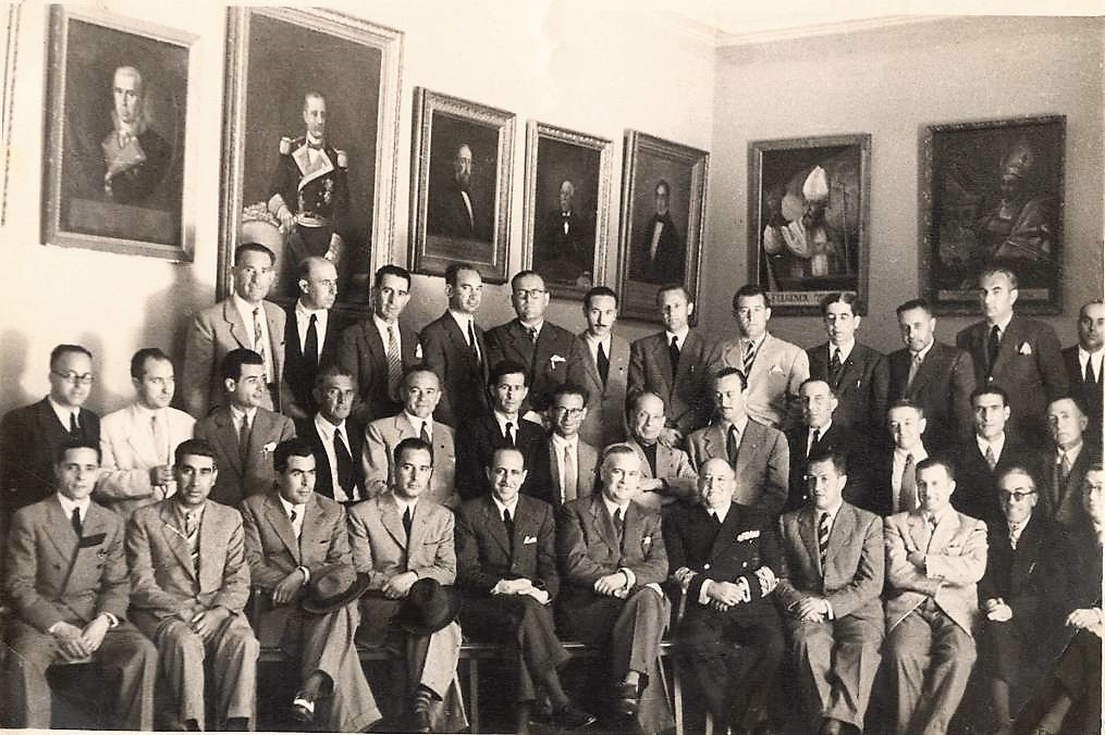 Firma del Acuerdo Base para el Suministro de Agua a la ciudad de Alicante - Alcalde Manuel Montesinos Gomiz. Tras unas duras negociaciones presididas por el Almirante Bastarreche, el alcalde de Alicante obtuvo un ventajoso Acuerdo Base por el que Alicante obtiene más agua.